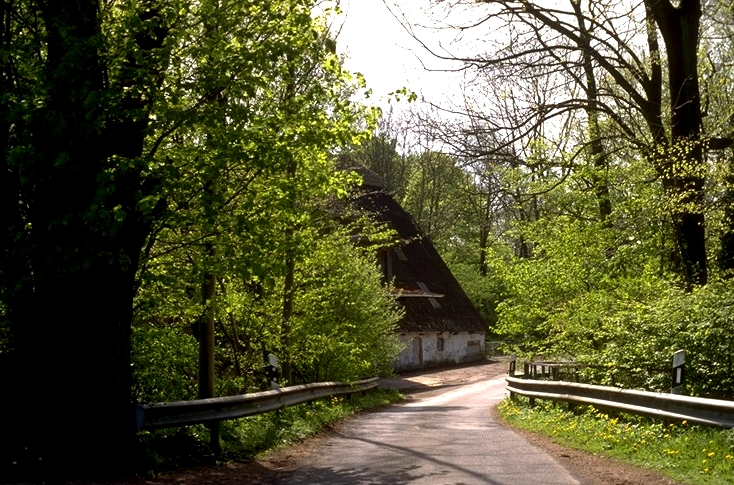 Deppendorf, ehemalige Wassermühle am Weg nach Arrode (Werther), aus der Sicht von Peter-August-Böckstiegel